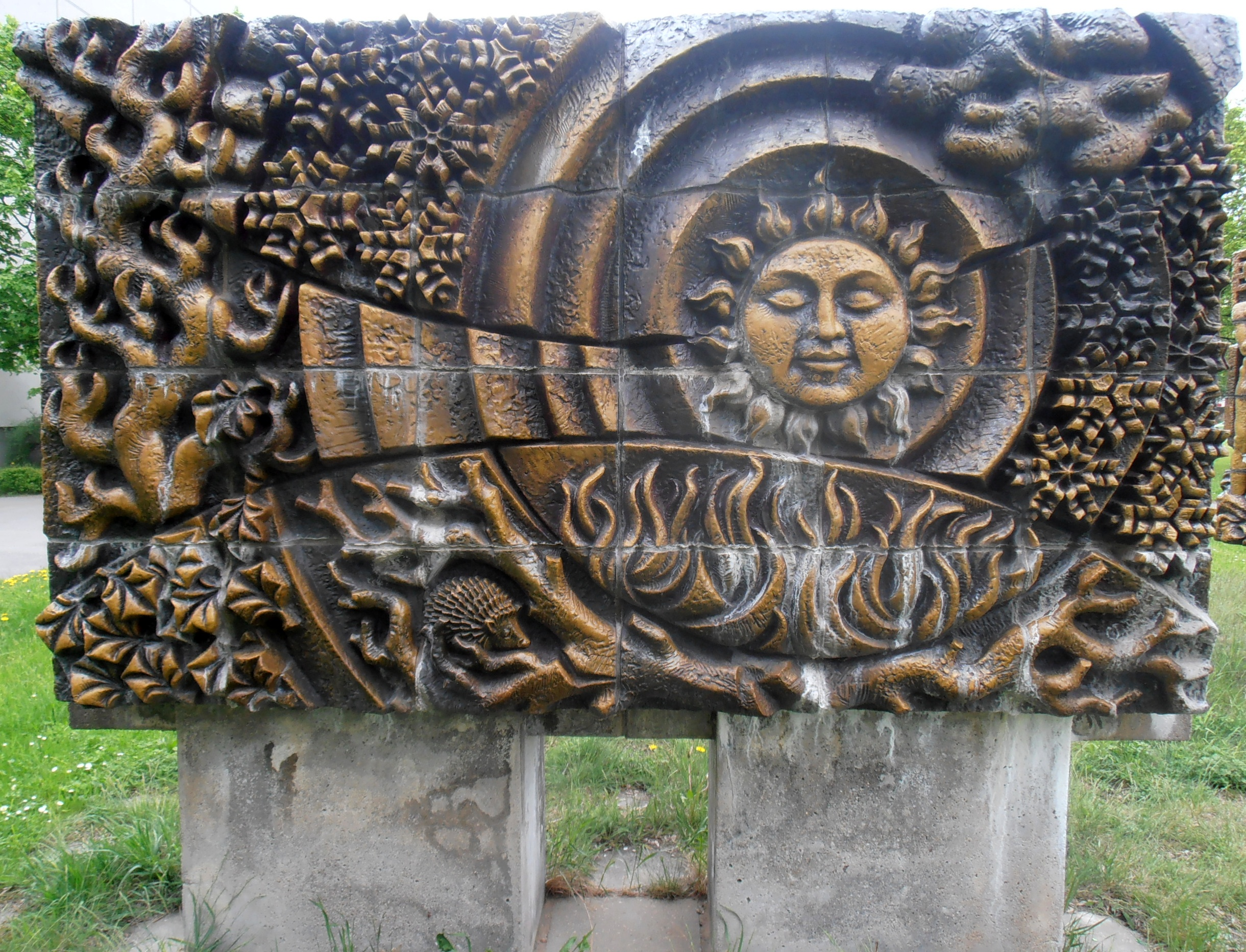 Bronzerelief mit Sonne aus dem Zyklus "Jahreszeiten und Lebenszeiten" (1978; V. Krüger, Ch. Schulze und E. Ponndorf) Dresden-Johannstadt, Striesener Straße